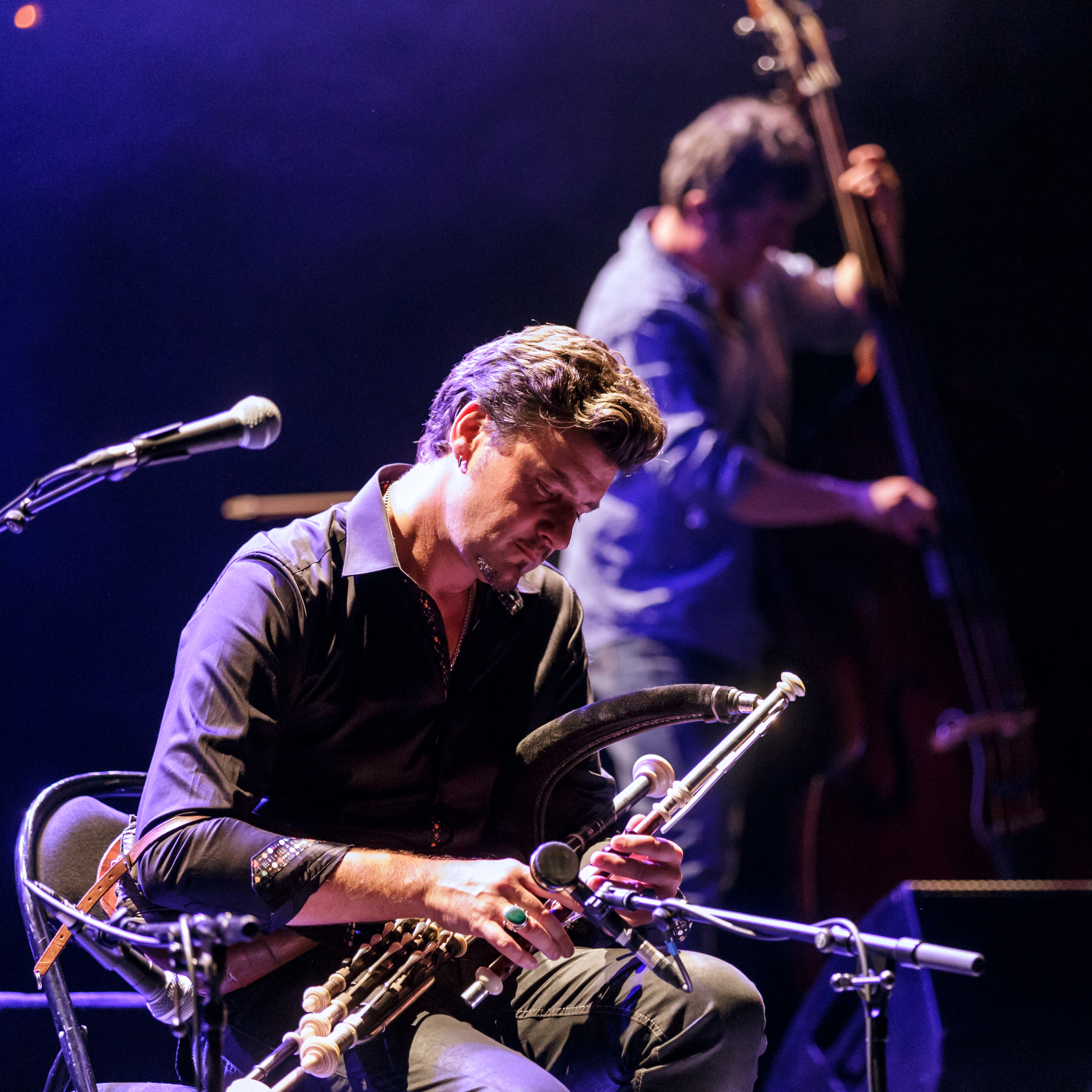 Ronan Le Bars et ses invités en concert au théâtre de Cornouaille lors du festival de Cornouaille à Quimper le 19 juillet 2016.